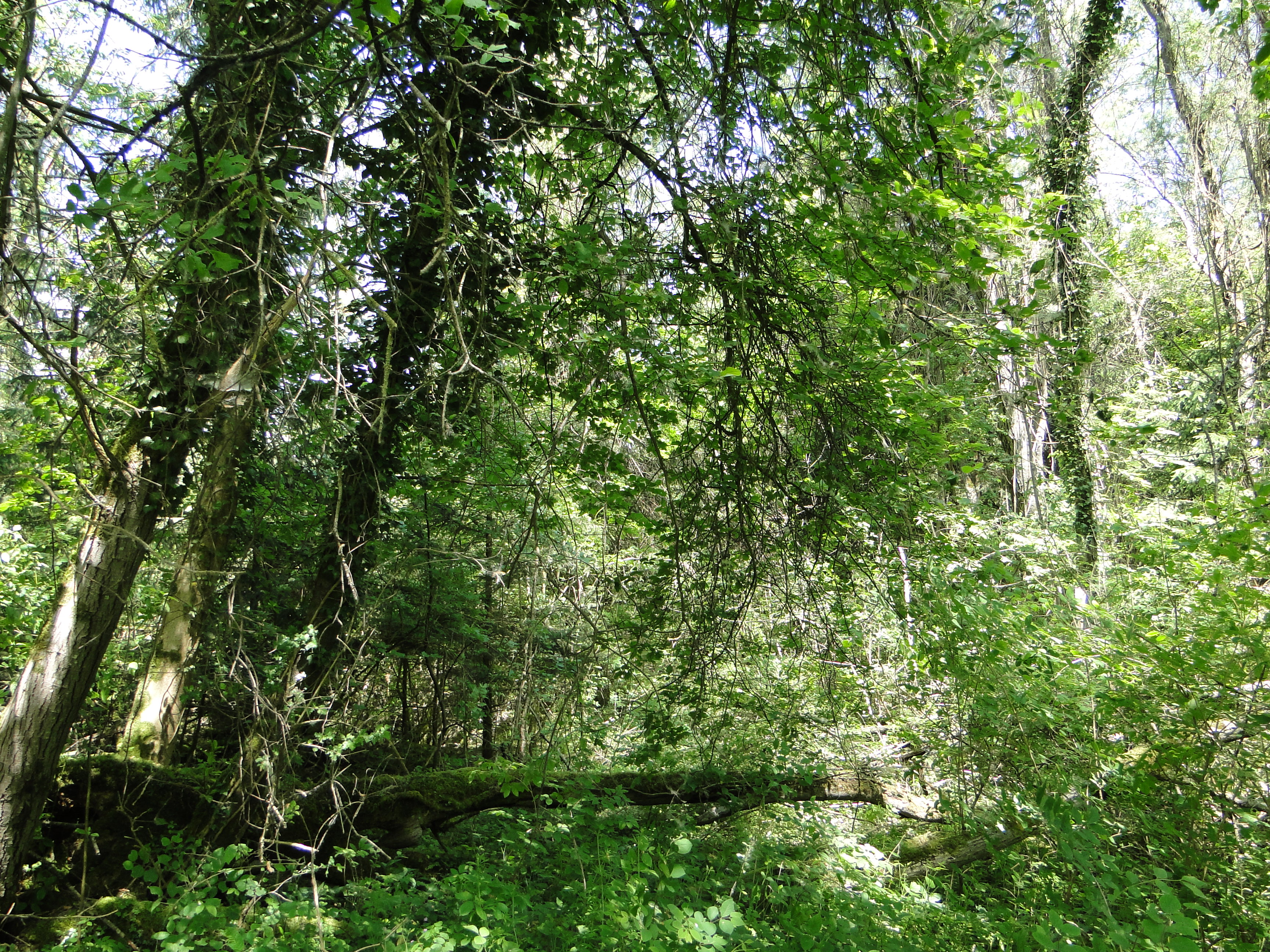 Sekundärurwald im Naturschutzgebiet Kiesgrube Aitrach